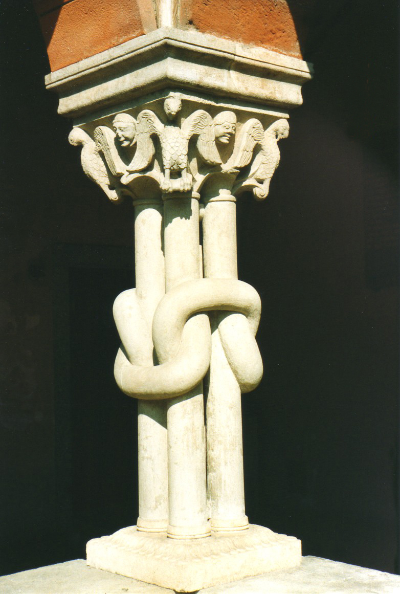 Abbazia di Chiaravalle a Milano: particolare di colonna del Chiostro. Autore Giorces.